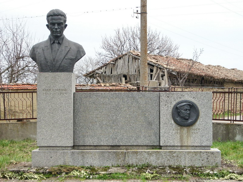 Село Берковски, община Попово. Антифашистки паметник в центъра на селото.